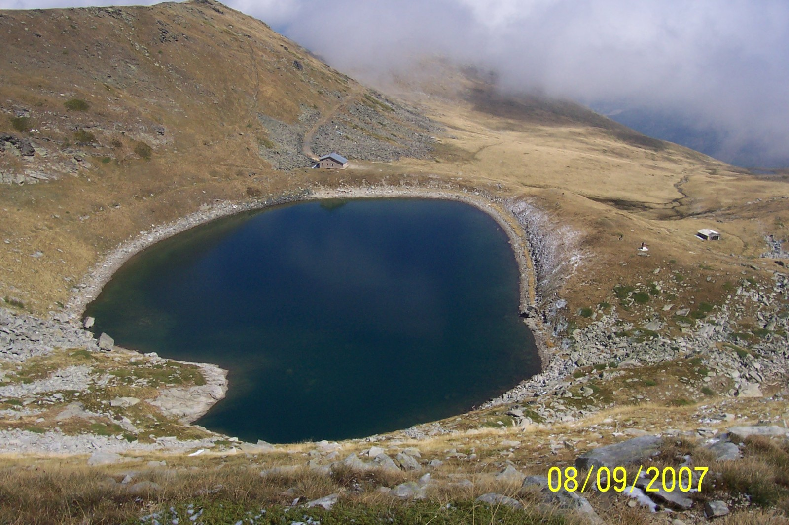 Големото Пел. Езеро